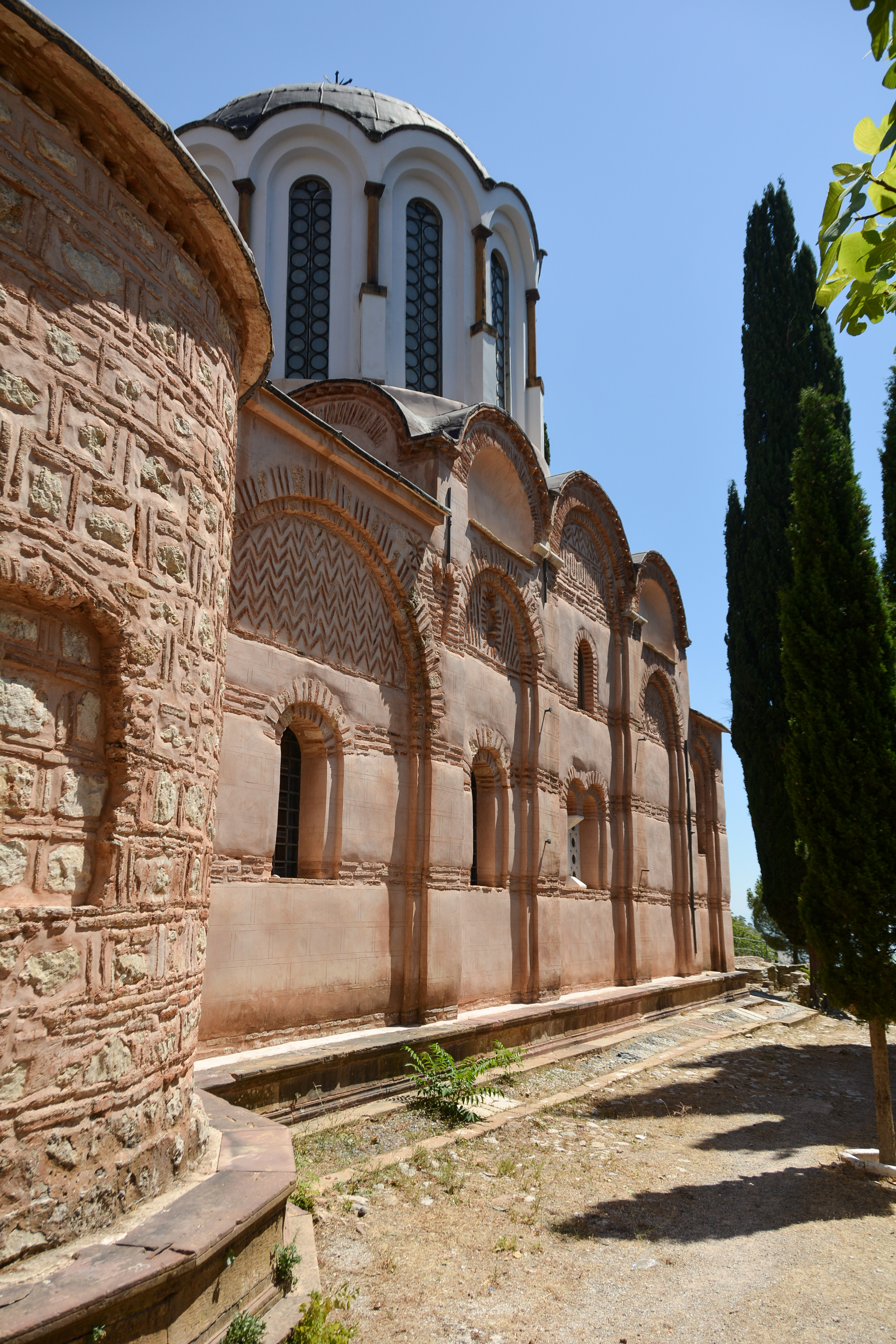 Νέα Μονή Χίου«Νέα Μονή Χίου»